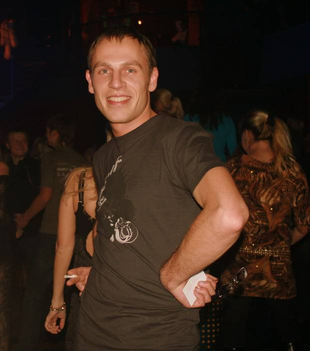 Диджей Иван Ионов в клубе "Мисто". город Харьков, 2008 г.